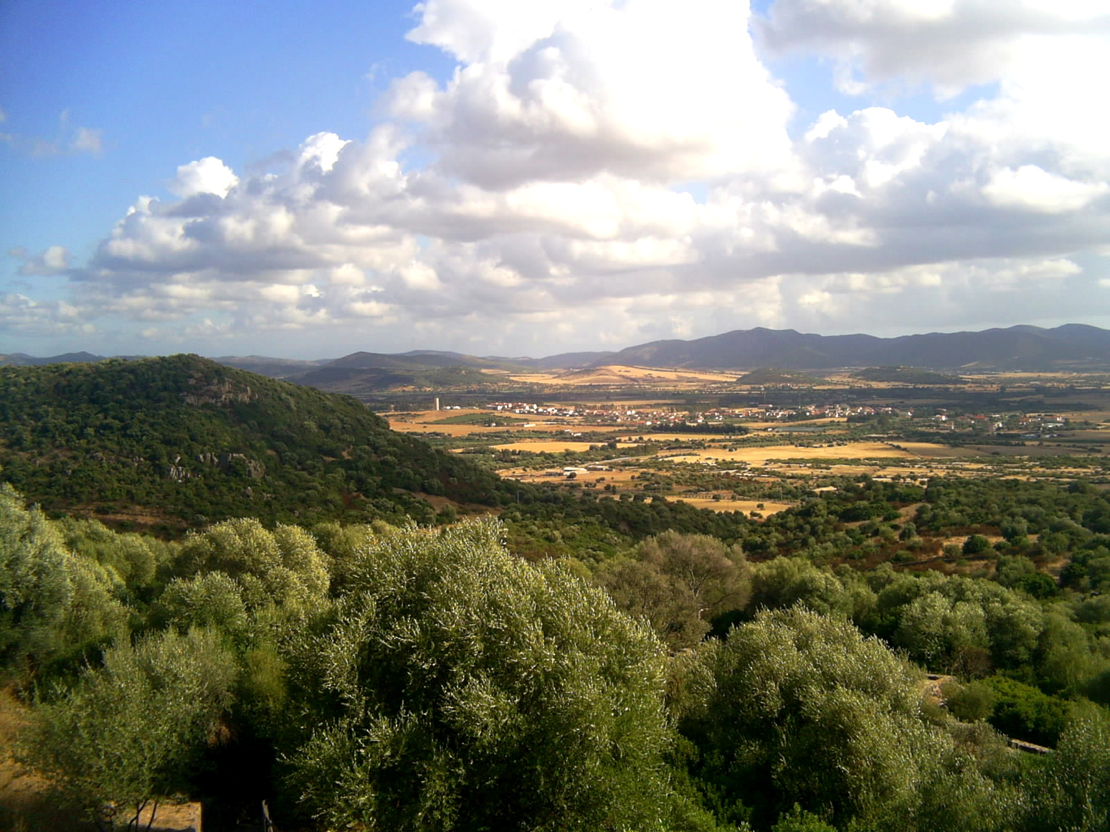 Vista dall'alto del paese di santadi